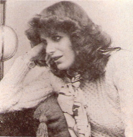 Valeria Lynch, cantante argentina